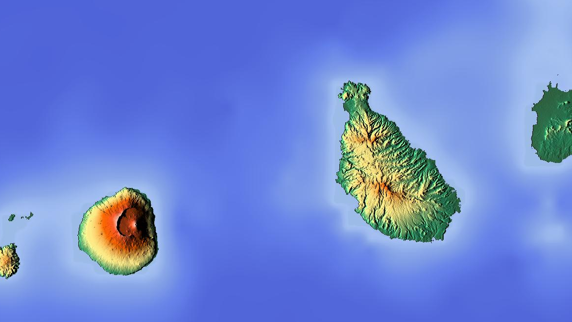 Relief map of Cape Verde